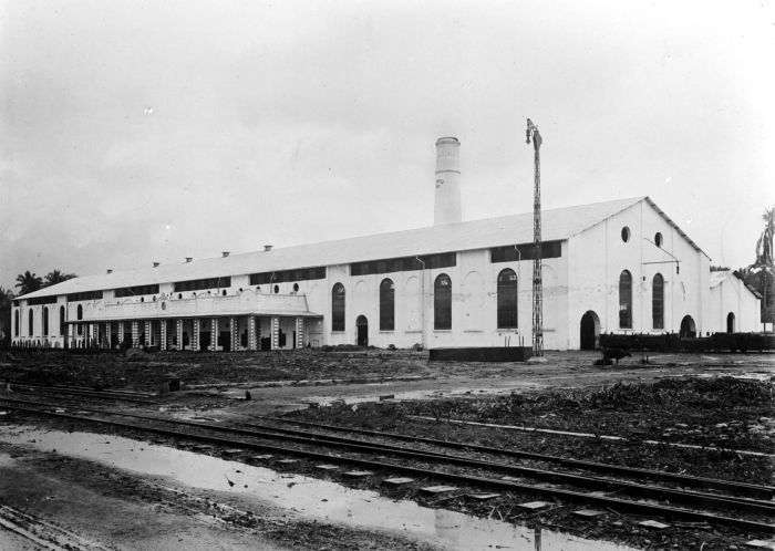 Repro Negatif. Tampak depan pabrik gula Klampok, Banjoemas